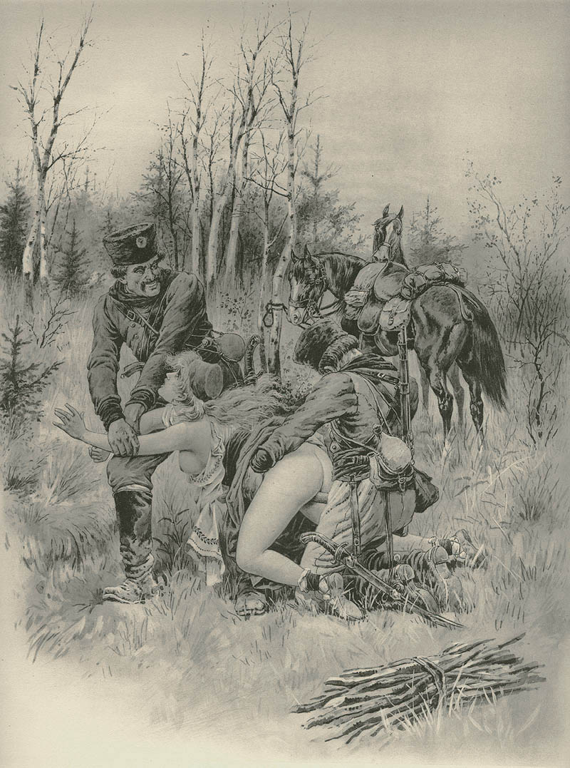 Balkangreuel